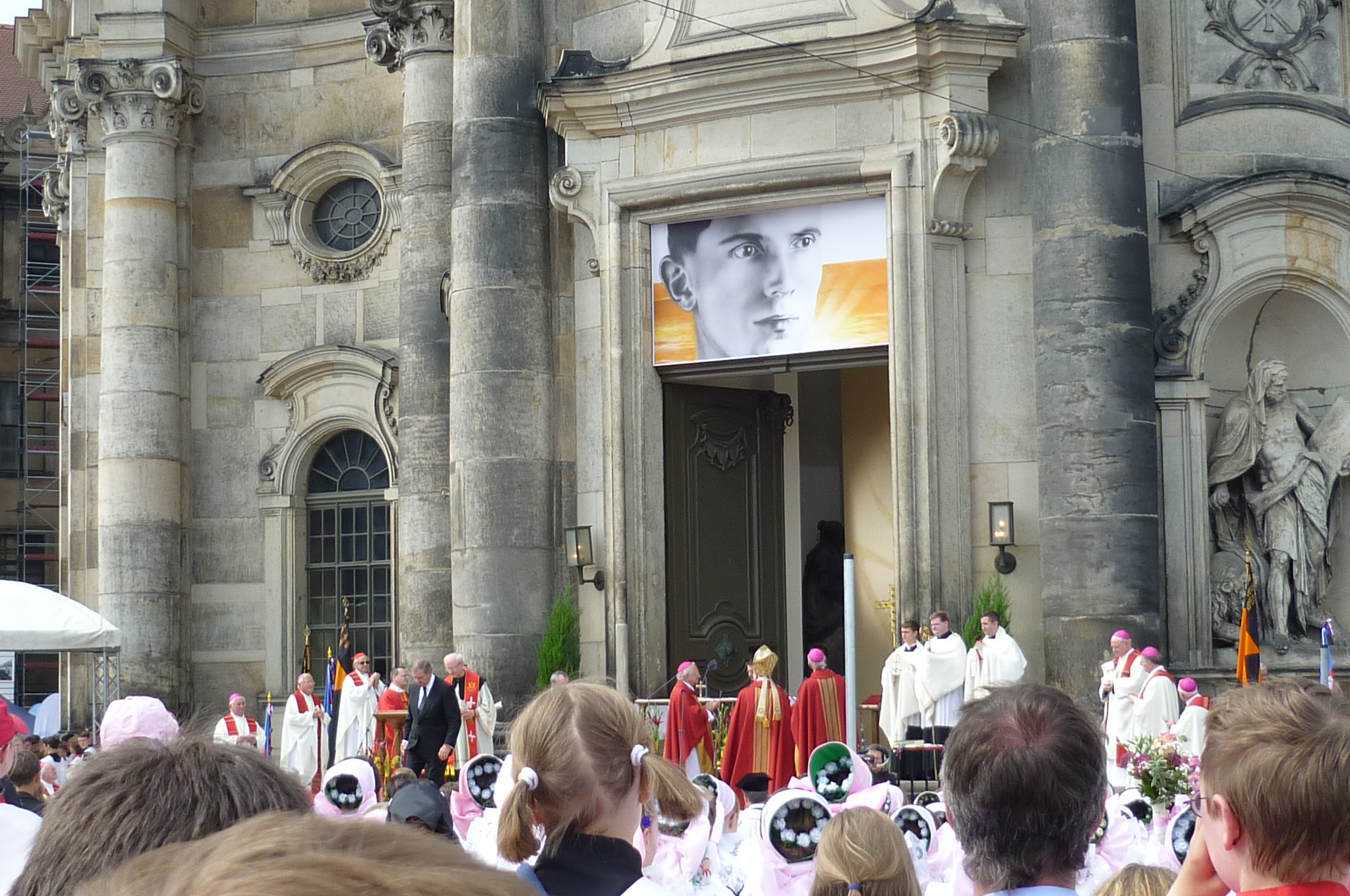 Feier der Seligsprechung von Alojs Andritzki vor der Kathedrale in Dresden